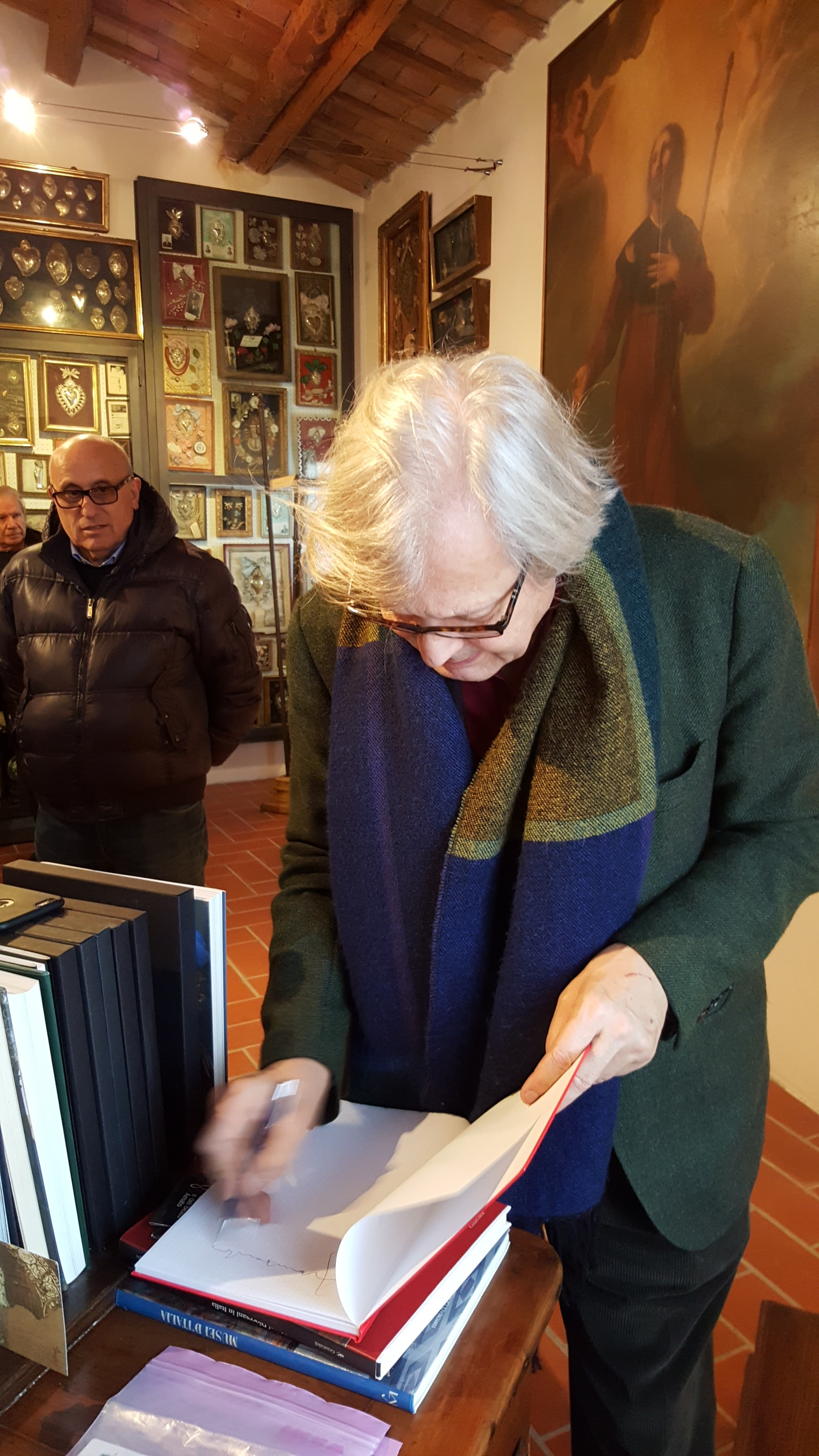 Museo di Saludecio e del Beato Amato This is a photo of a monument which is part of cultural heritage of Italy.